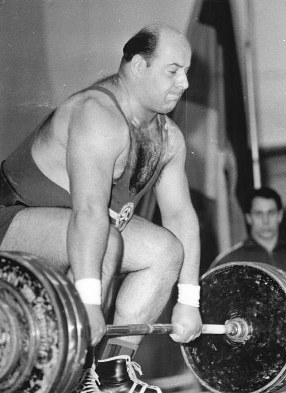 Werner Arnold Zentralbild Studré 07.11.1965 Berlin: Deutsche Meisterschaften im Gewichtheben - Arnold siegte im Schwergewicht. Werner Arnold (SC Karl-Marx-Stadt) konzentriert sich vor seinem Versuch im Drücken. Im Schwergewicht hatte er keine ernsthafte Konkurrenz und holte sich mit einer Dreikampfleistung von 455 kg den Titel. Mit den Entscheidungen im Mittelschwer- und im Schwergewicht endeten am 07.11.1965 in der Berliner Sportstätte am Weißen See die deutschen Meisterschaften der Gewichtsheber. Abgebildete Personen: Arnold, Werner: Gewichtheber, DDR